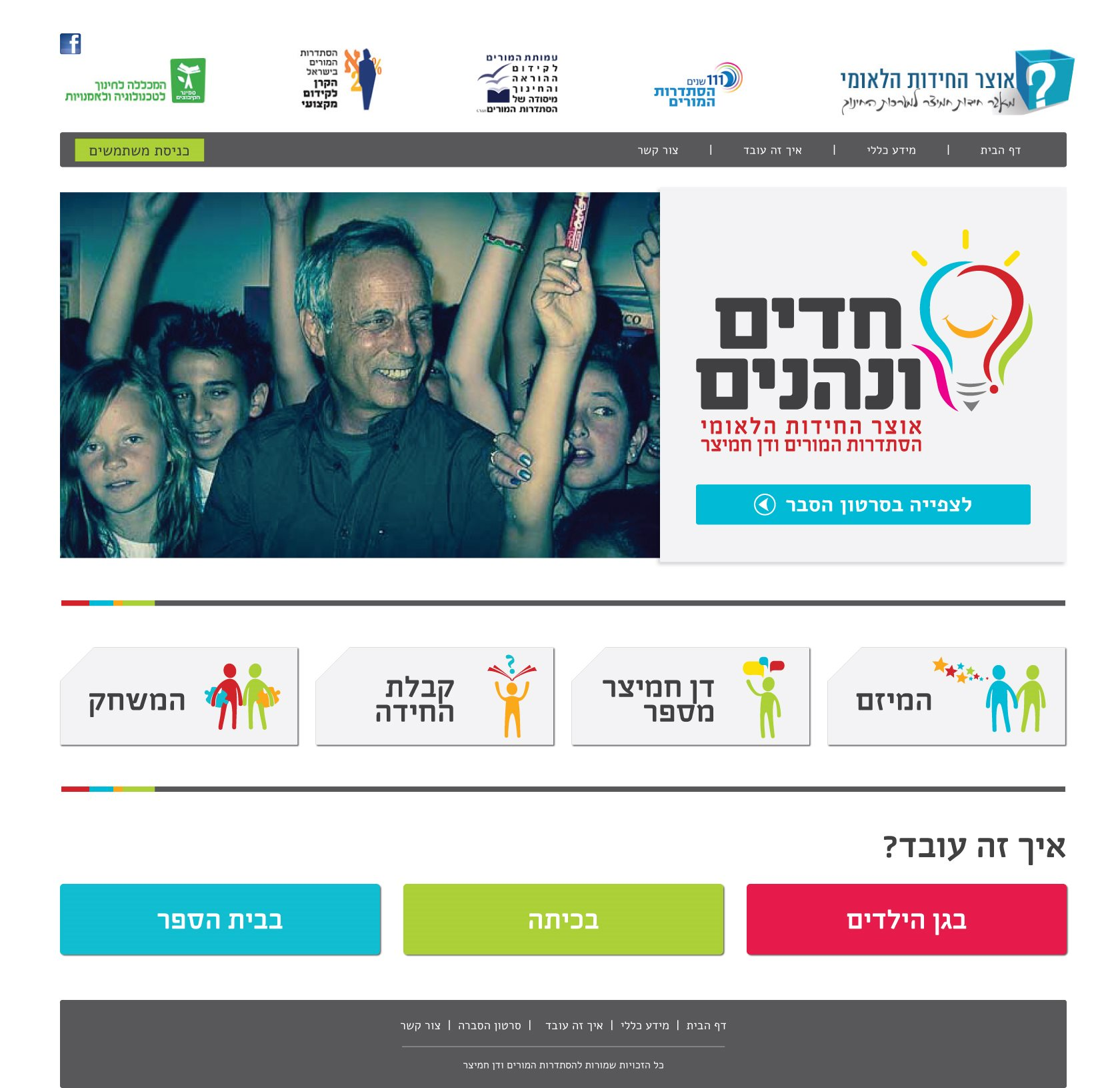 אוצר החידות הלאומי חדים ונהנים